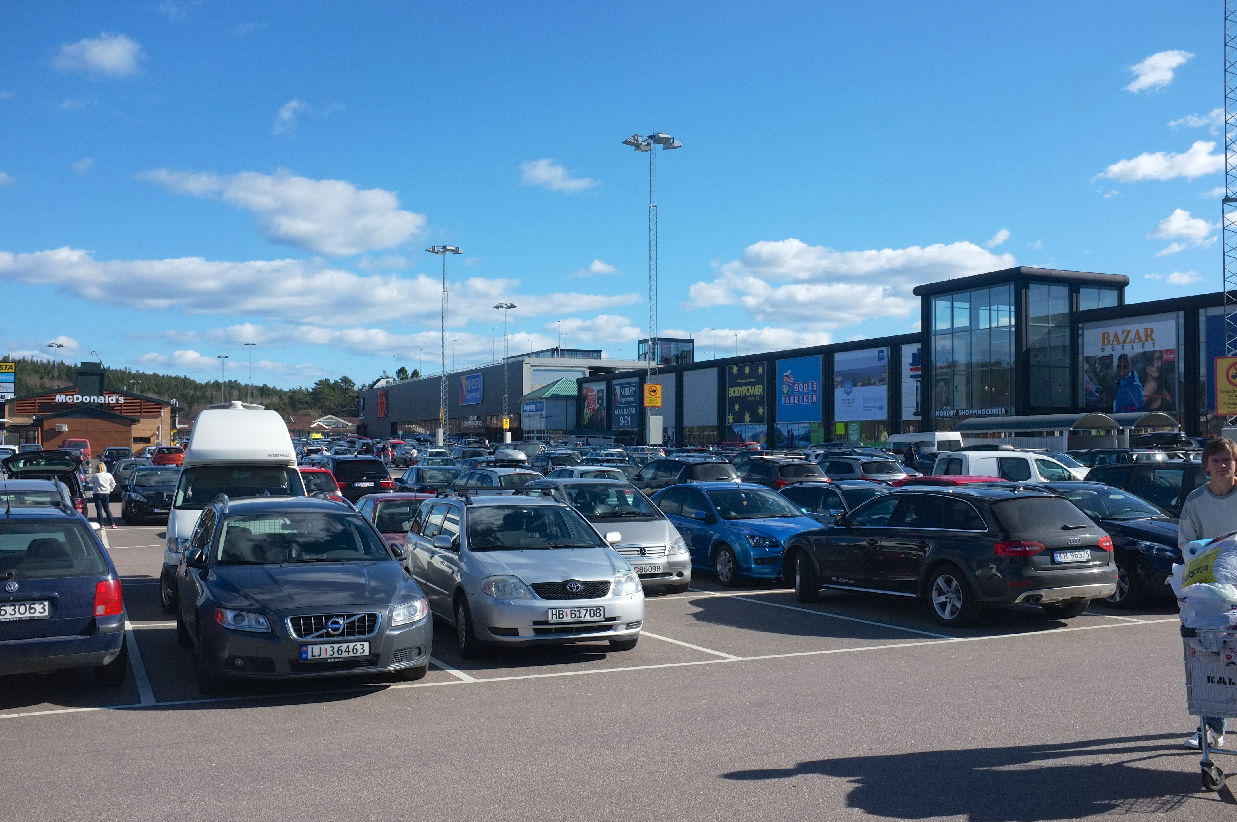 Nordby Shoppingcenter i Sverige.